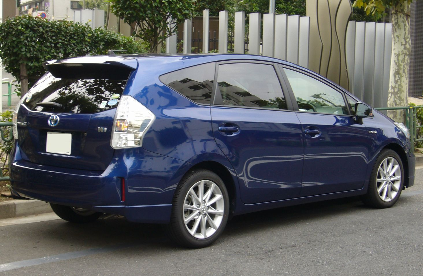 トヨタ・プリウスα